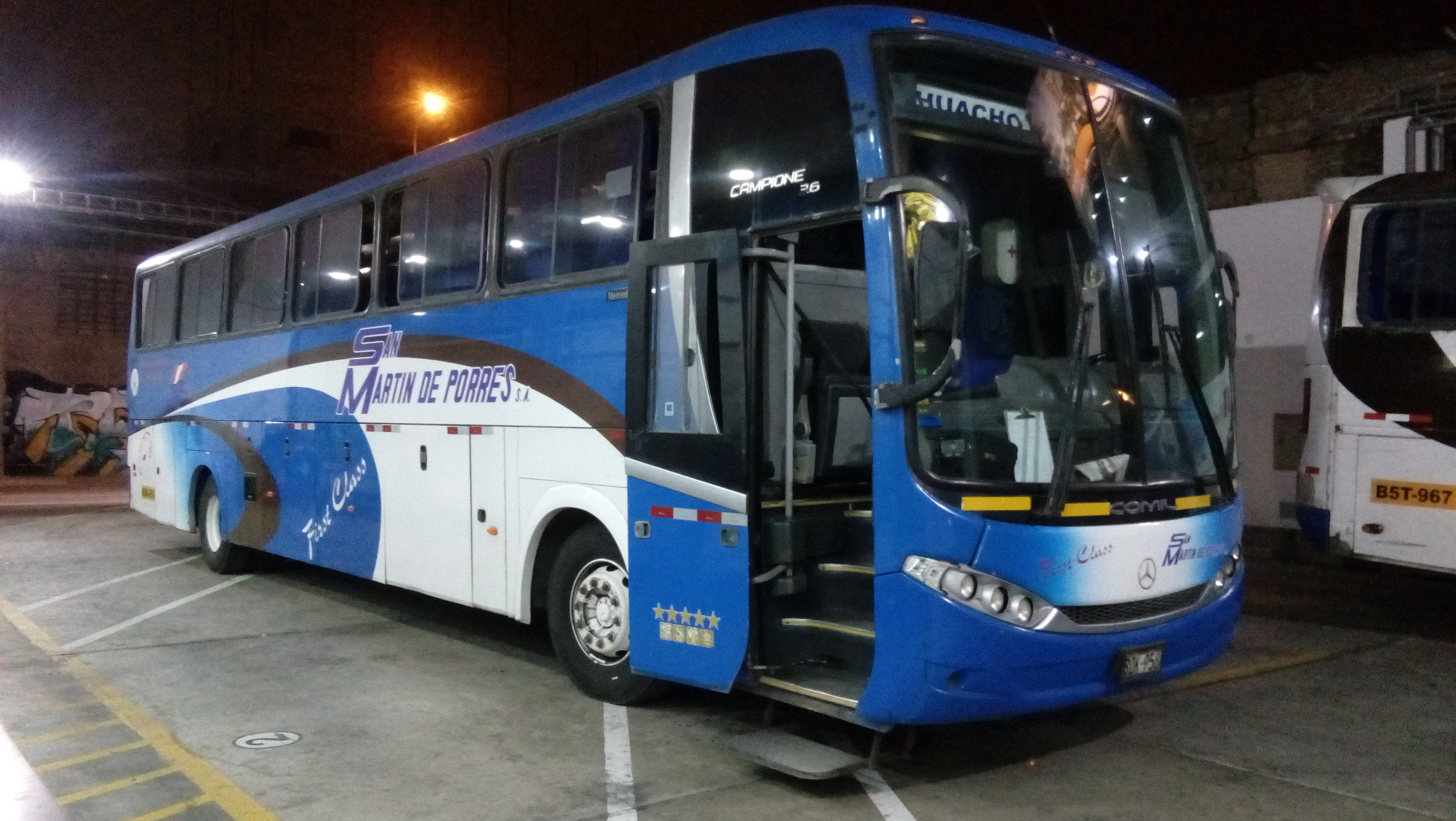 Bus de la empresa San Martin De Porres similar al bus caído en la Curva del Diablo el 2 de Enero de 2018.